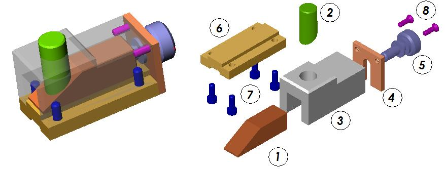 Copie d'écran SolidWorks. Assemblage de plusieurs pièces. Rendu par défaut.